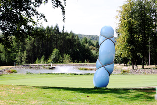 Beispiel aus der Werkserie "Blow up", hier: im Außenbereich